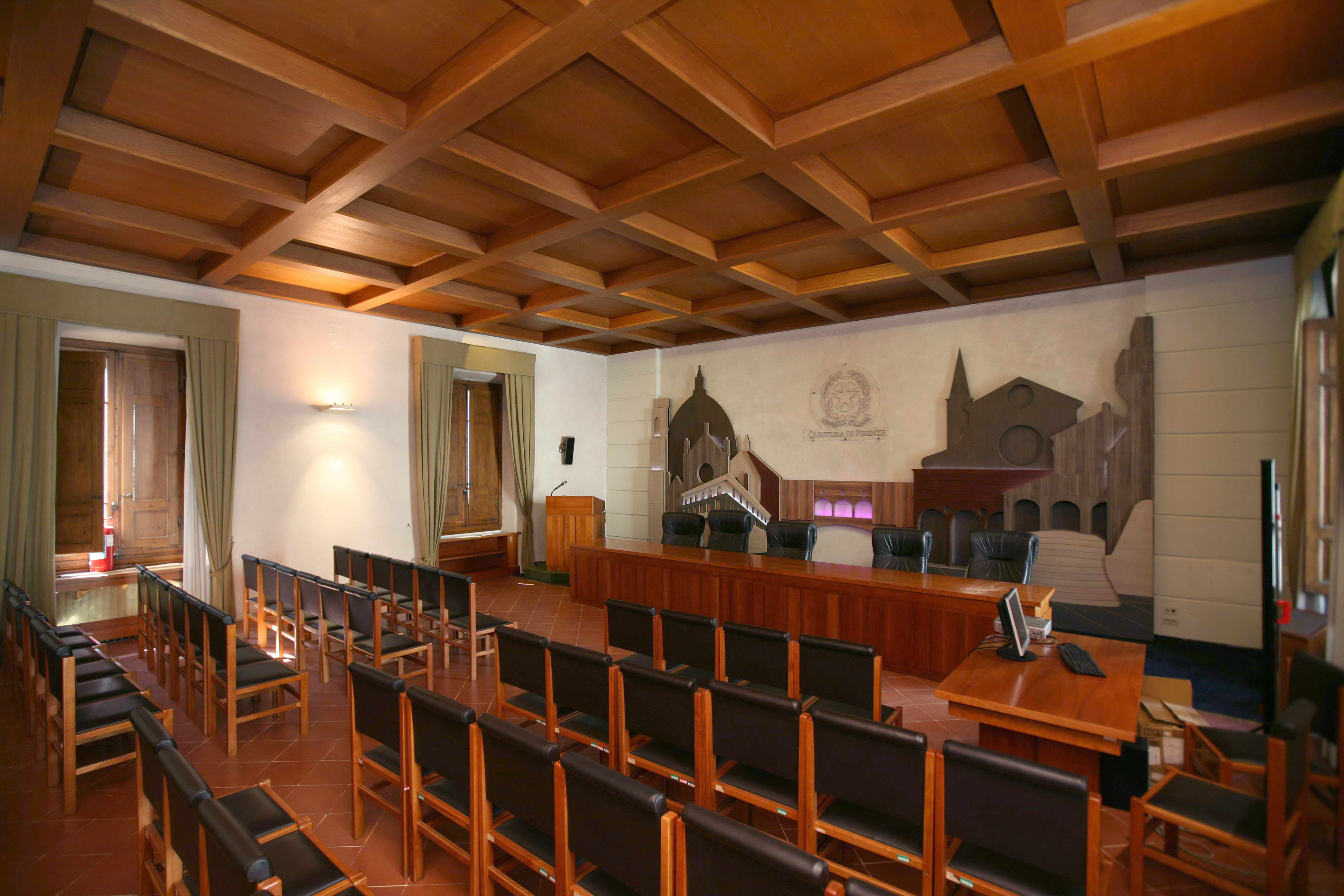 Questura di Firenze